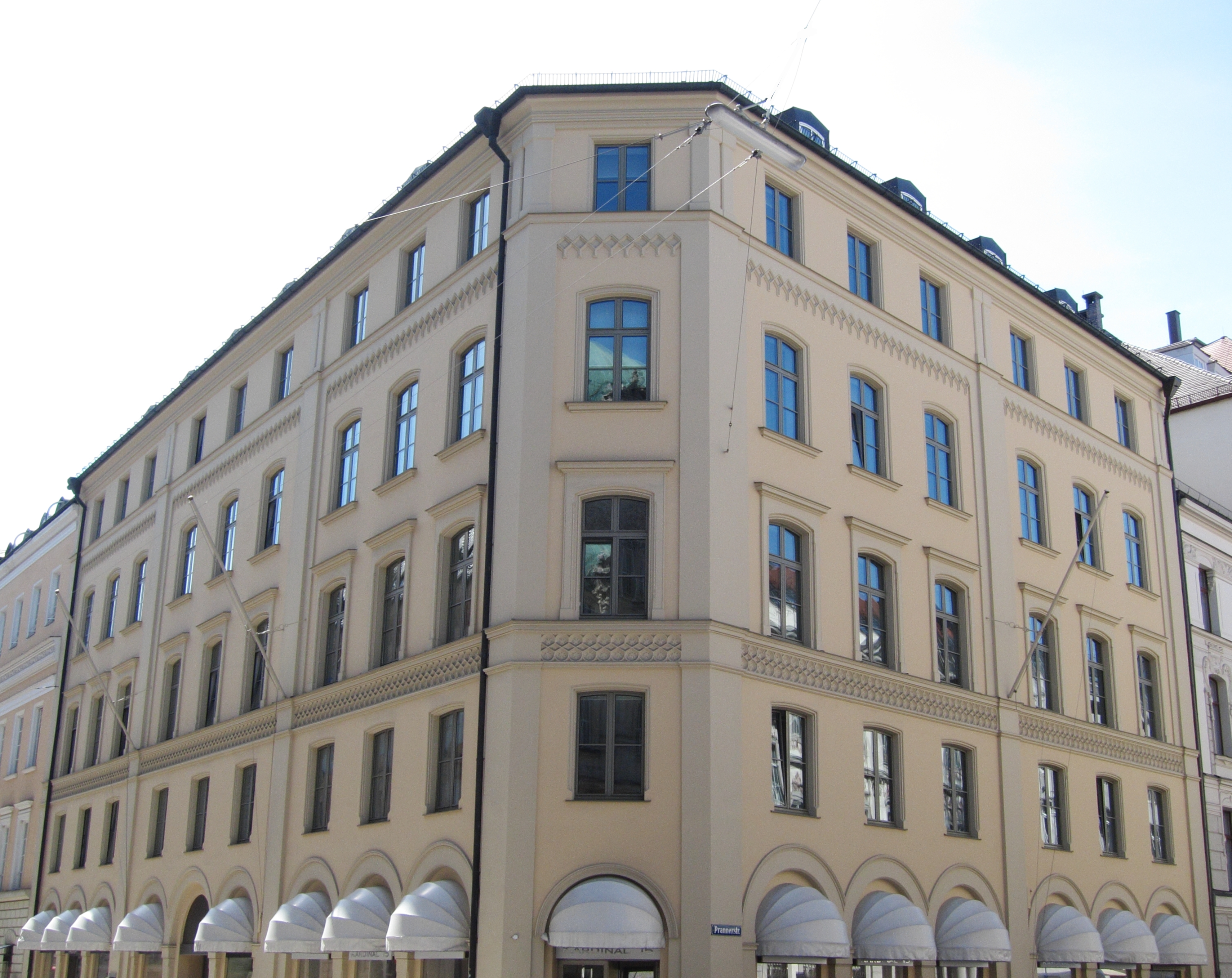 Kardinal-Faulhaber-Straße 15; Wohn- und Geschäftshaus fünfgeschossiger Eckbau, errichtet im Maximilianstil nach Plänen von Jordan Maurer († 1854) und Reinhold Hirschberg, 1855-1857, nach Kriegsschäden Wiederaufbau durch Wilhelm Demmer, 1948-1950. This is a photograph of an architectural monument.